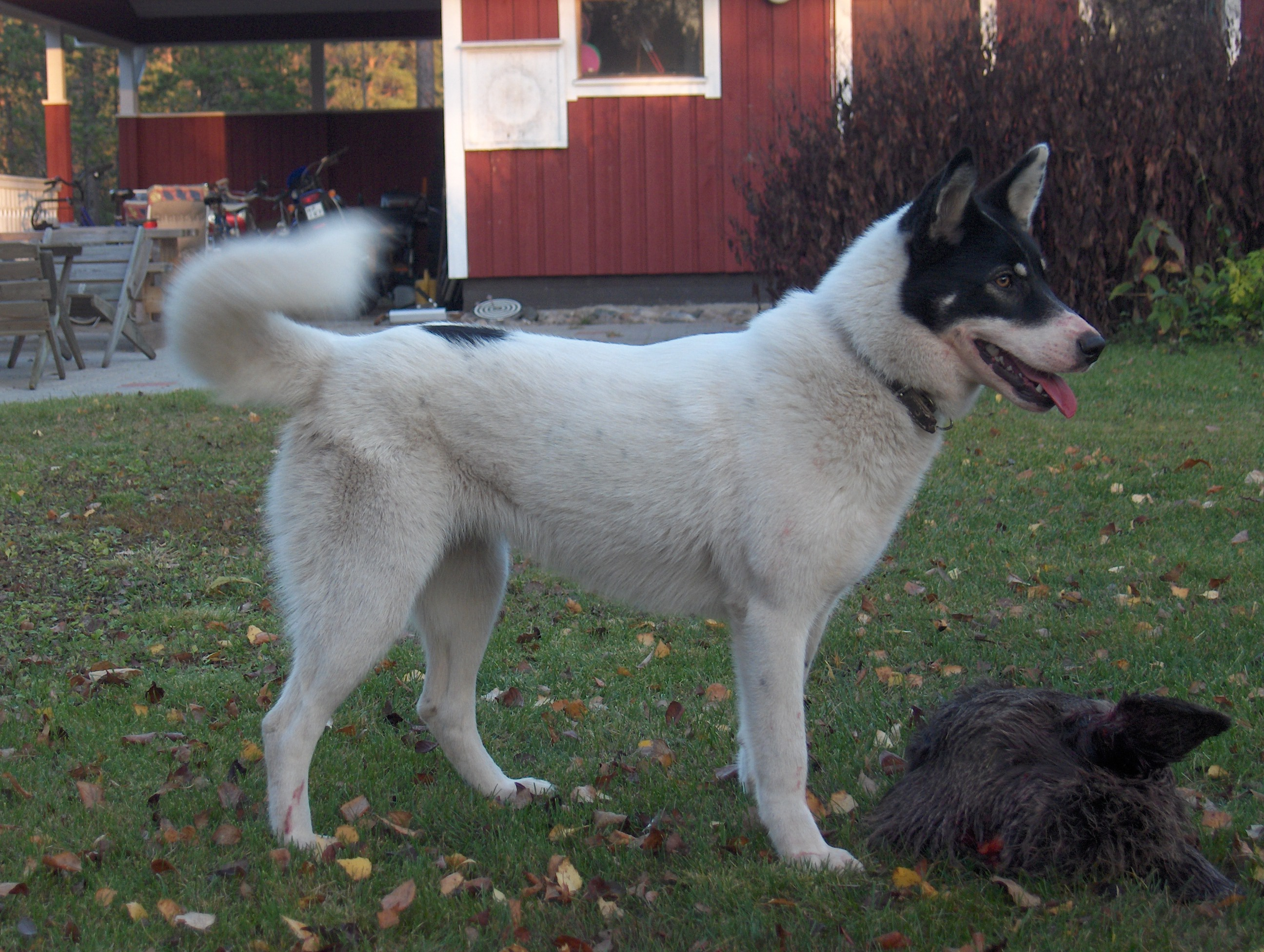 east siberian laika